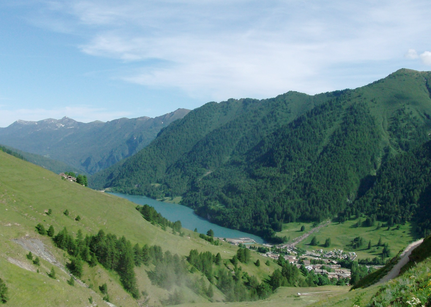 La frazione capoluogo di Pontechianale, in valle Varaita (CN), adagiata sul lago. Vista dalla strada che conduce al rifugio Helios ed agli impianti sciistici delle Conce.